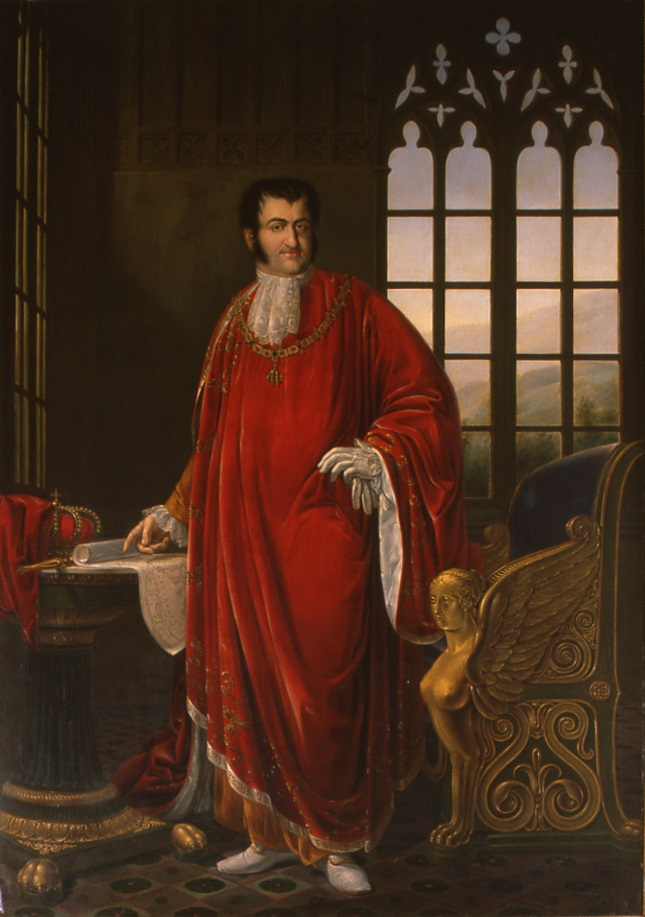 Retrato del rey Fernando VII de España (1784-1833), que fue hijo del rey Carlos IV de España. El monarca aparece revestido con el uniforme de gran maestre de la Orden del Toisón de Oro.